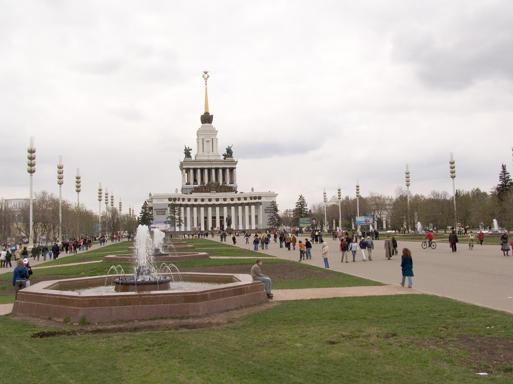 All-Russian Exhibition Centre (Всероссийский выставочный центр) in Moscow.